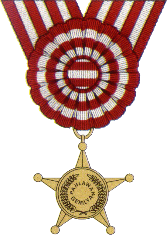 Орден Партизанская звезда